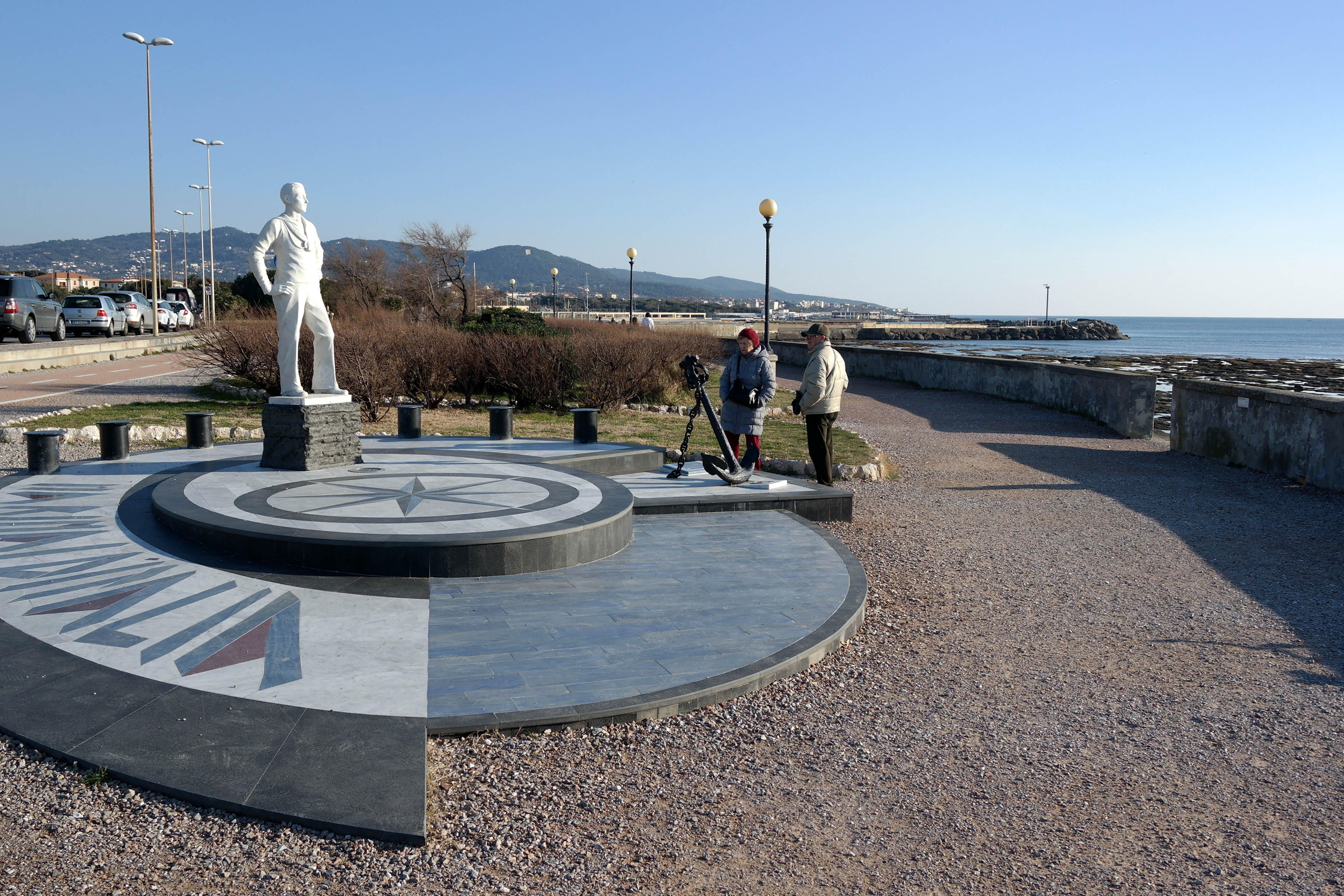 Statua del Marinaio sul lungomare di Livorno